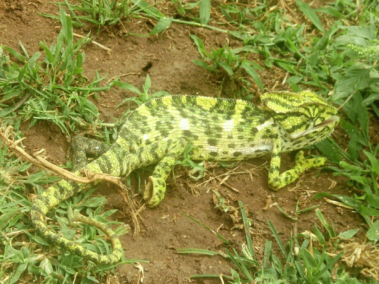 ಕನ್ನಡ: ಓತಿಕಯಾತ, ಮಳವಳ್ಳಿ